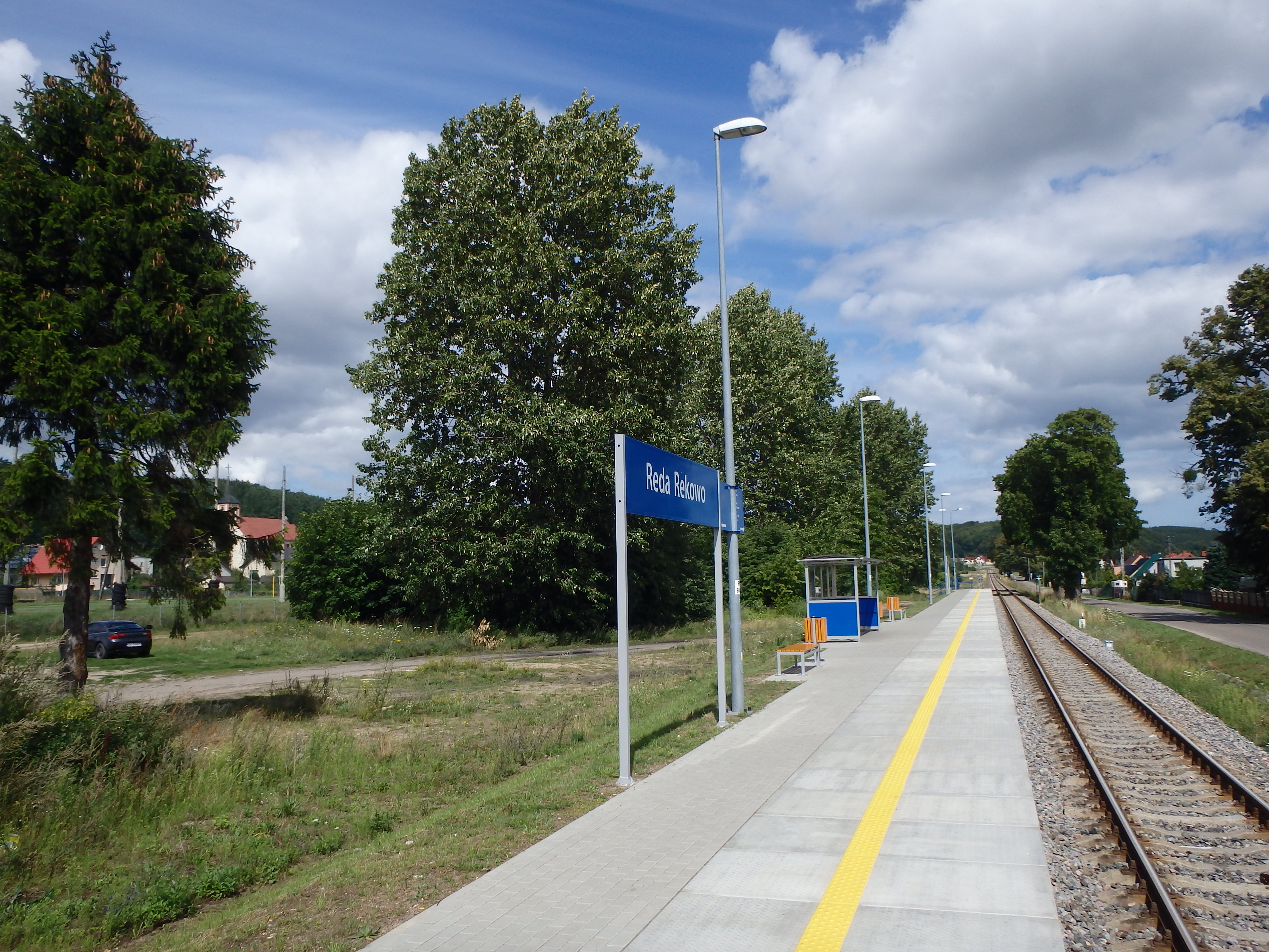 przystanek Reda Rekowo, peron - widok na szlak w kierunku Mrzezina